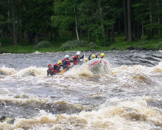 Rafting in Fänforsen (Västerdalälven), Björbo, Sweden.